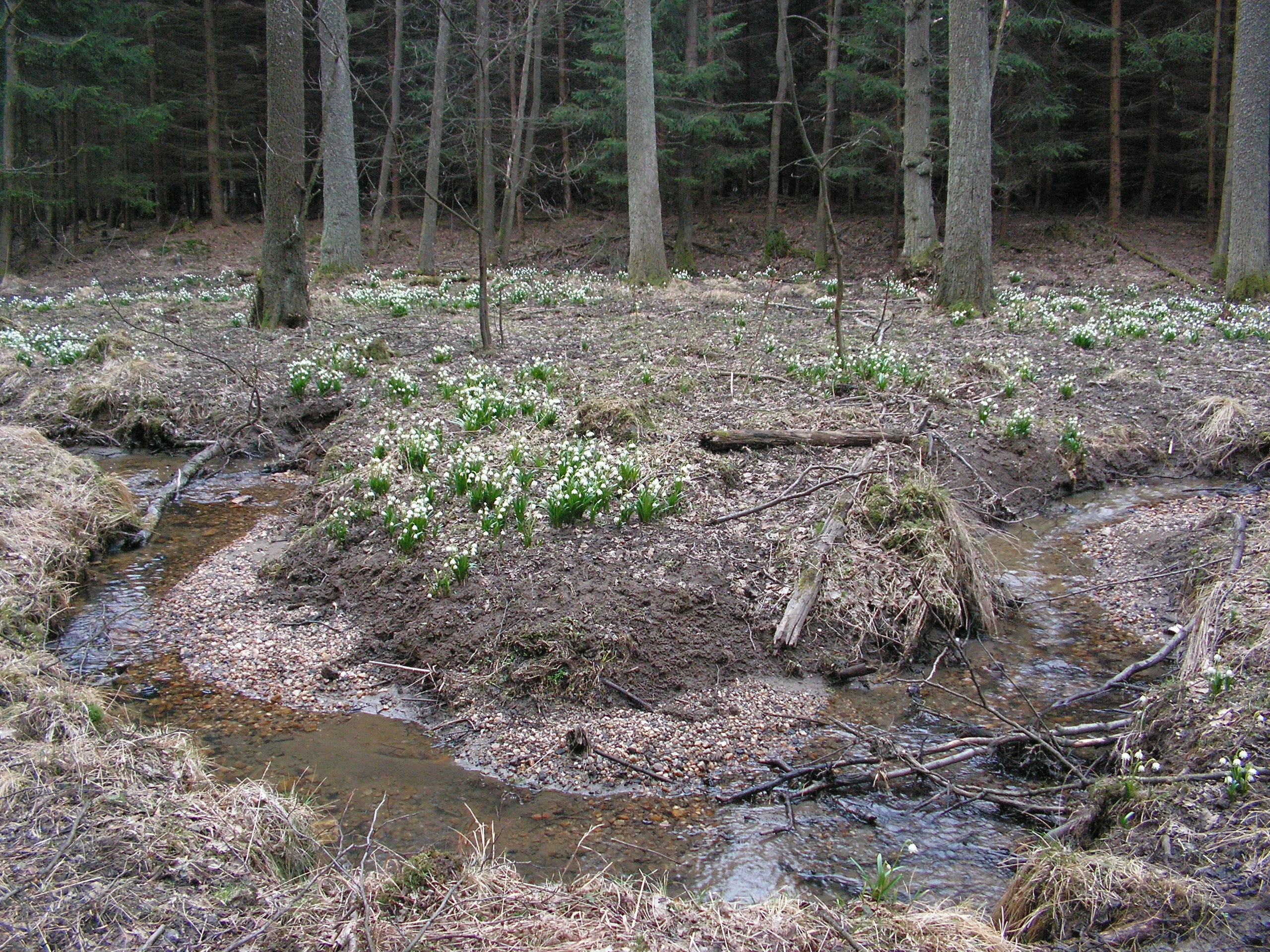 Chlumský potok v přírodní rezervaci Velká a Malá olšina, která se nachází na rozhraní okresů Havlíčkův Brod a Kutná Hora.